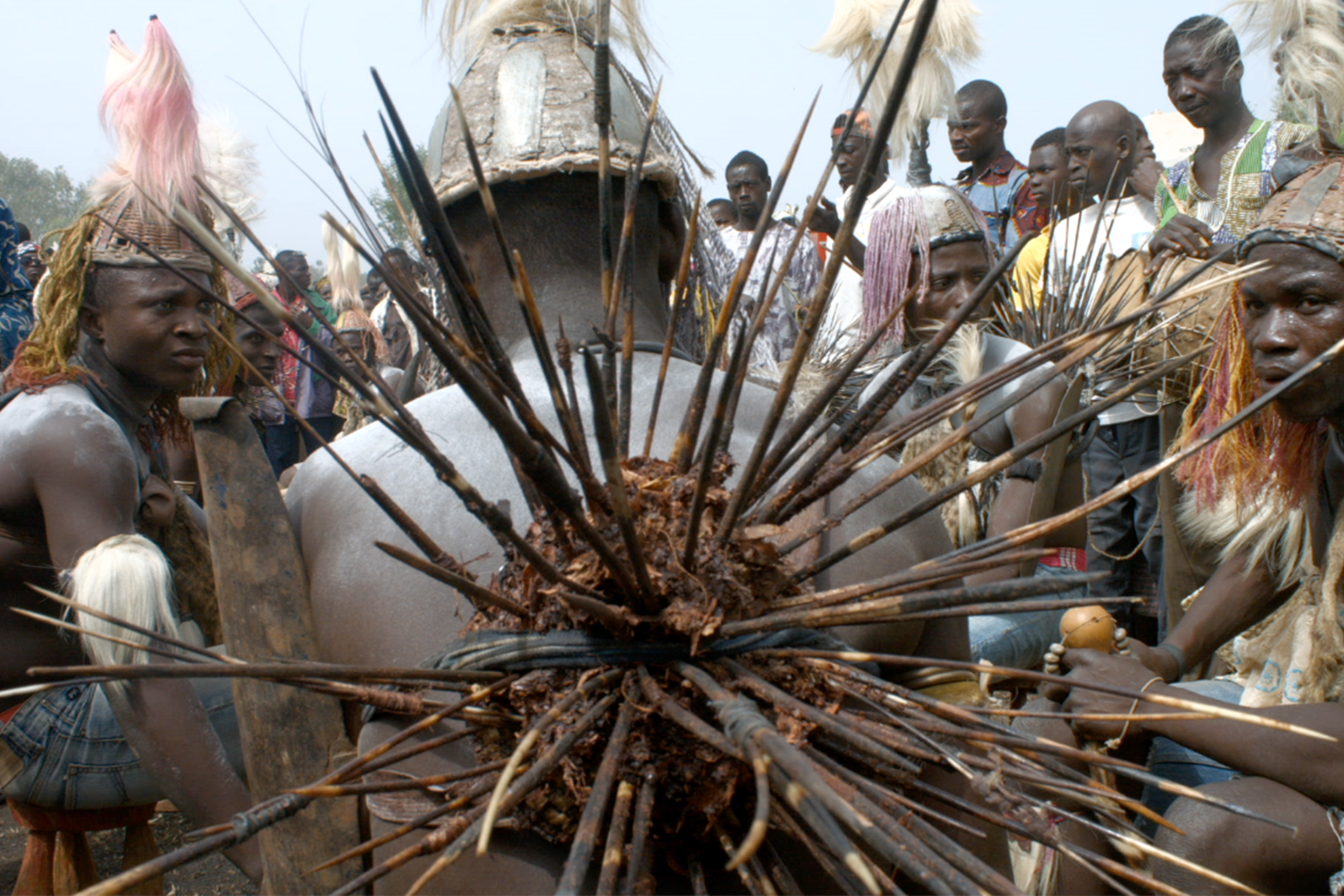 Fête traditionnelle-habye This is an image from Togo